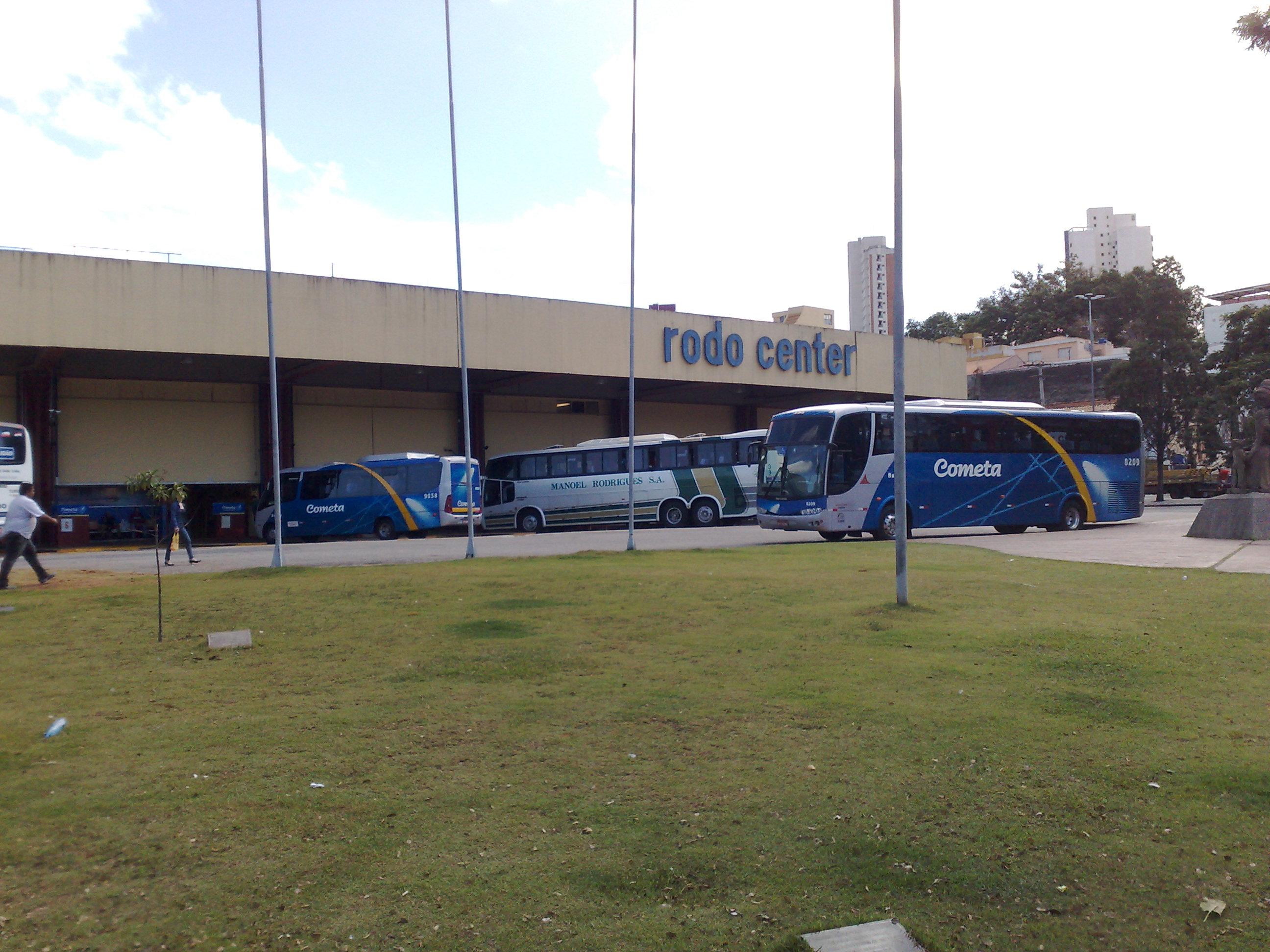 Rodoviária de Sorocaba, SP